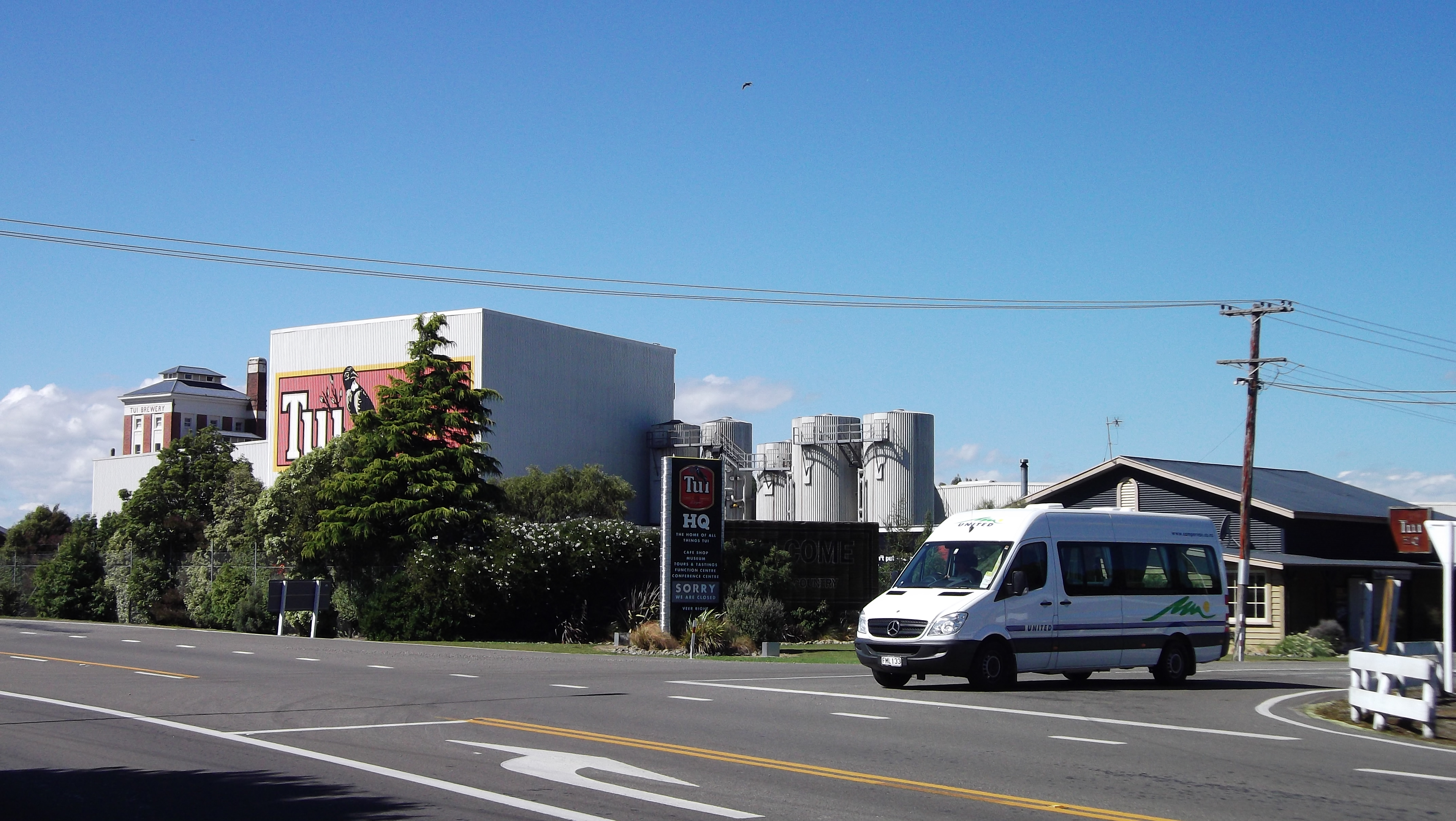 Tui Brewery, Mangatainoka